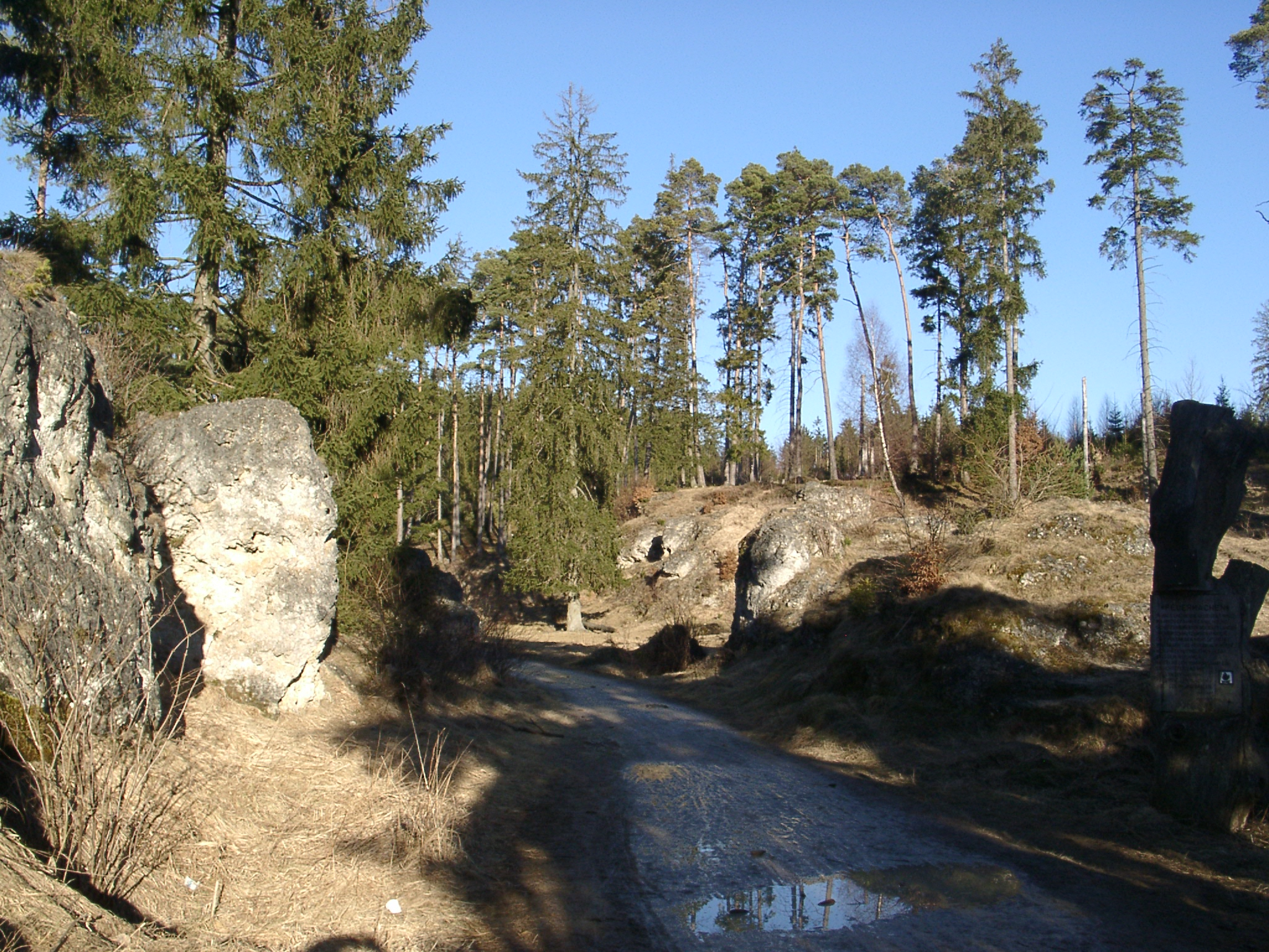 Felsenmeer Wental, ein Teilabschnitt des Naturschutzgebiets „Wental mit Seitentälern und Feldinsel Klösterle“